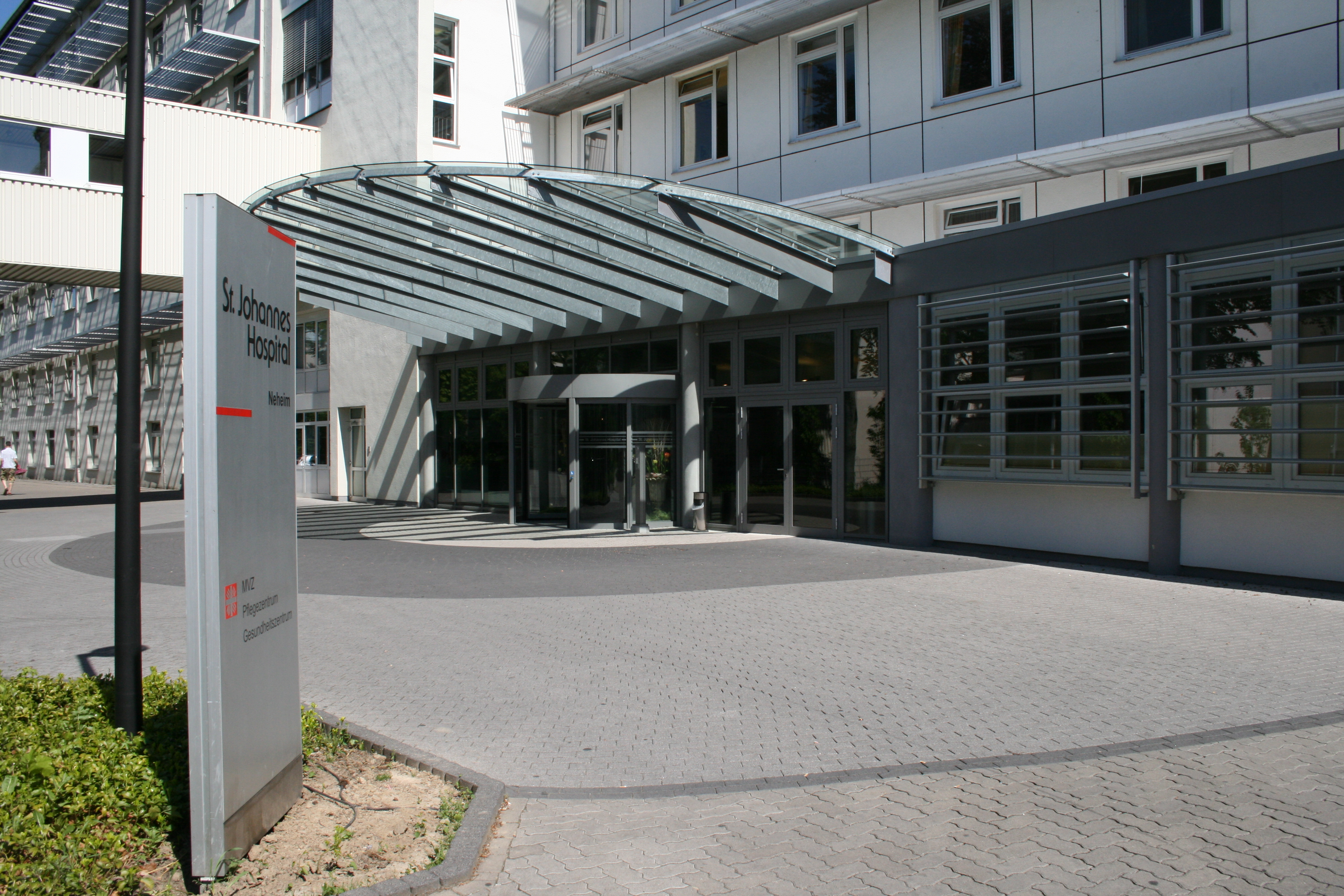 St-Johannes Hospital